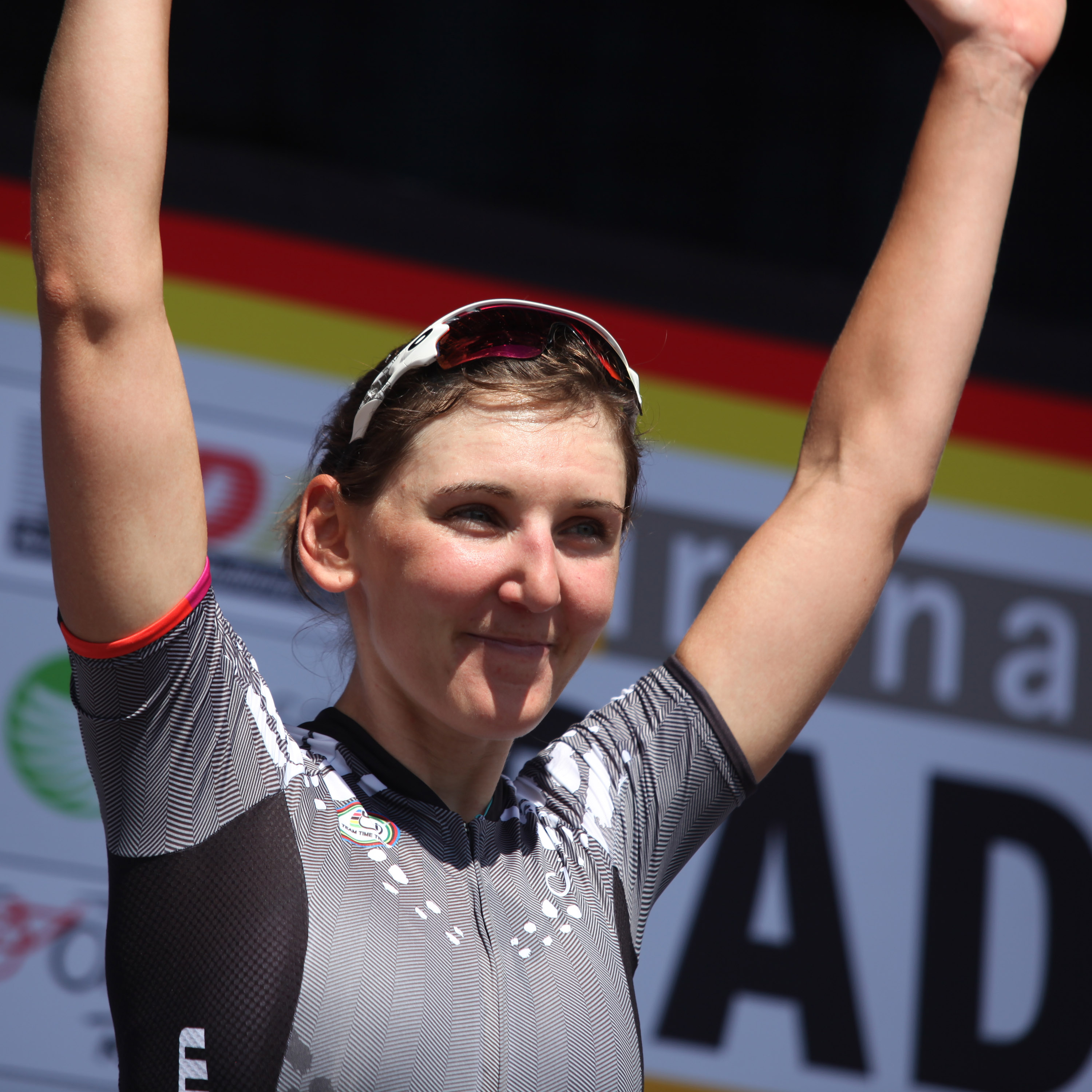 Lisa Brennauer bei der Siegerehrung. Foto von den Deutschen Meisterschaften im Straßenrennen der Männer (Elite) am 28. Juni 2015 in Bensheim (Hessen)